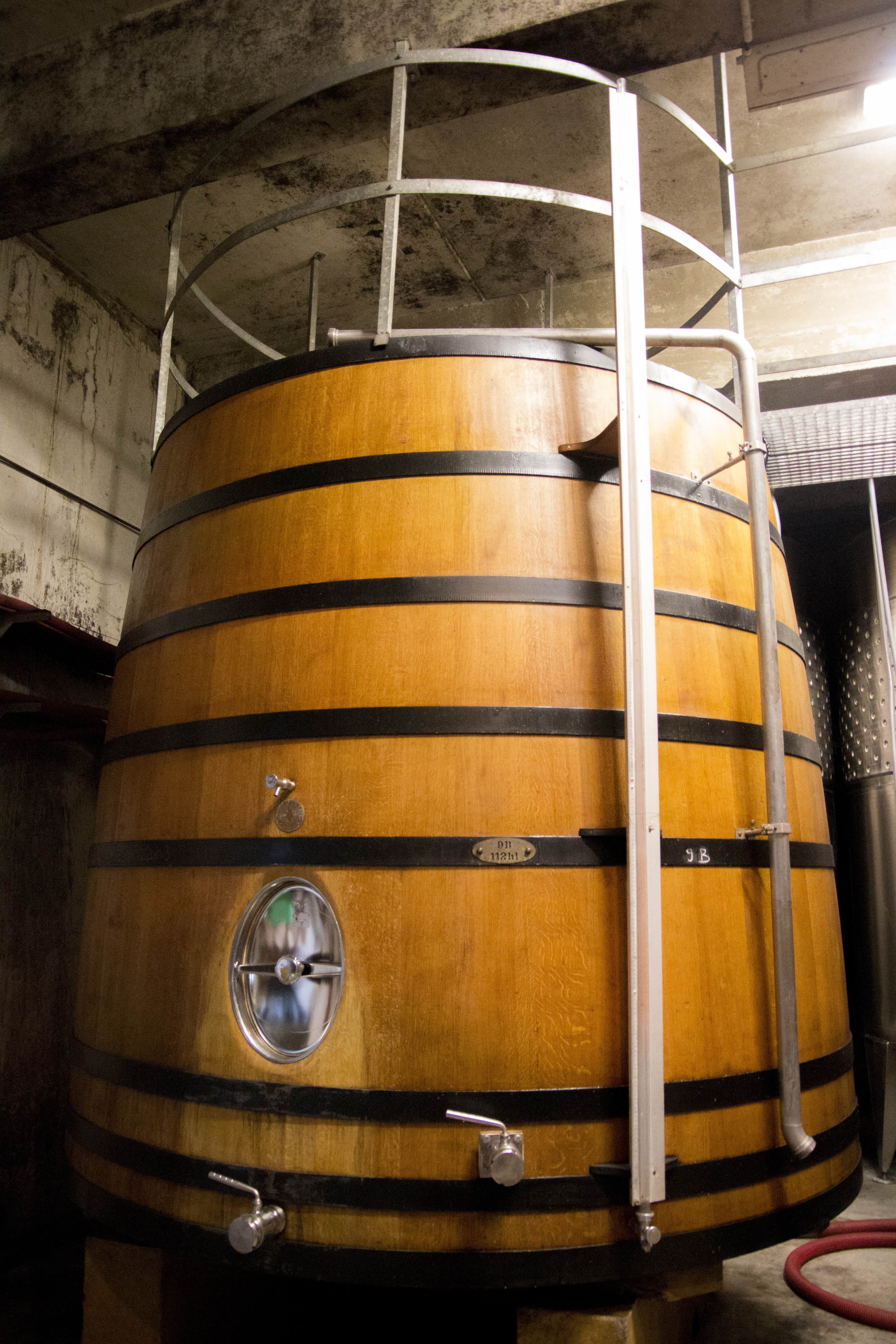 Cuve en bois tronconique